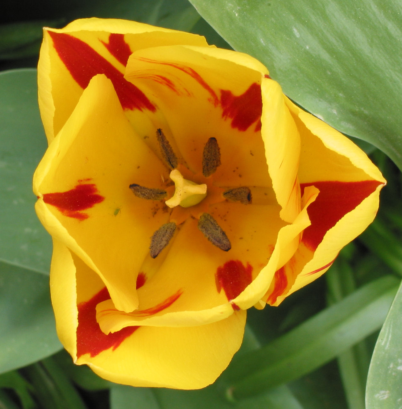 zelfgemaakte foto van tulp